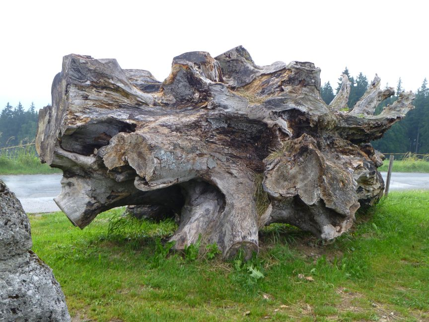 Stamm der umgestürzten Kaiserbuche am Haunsberg